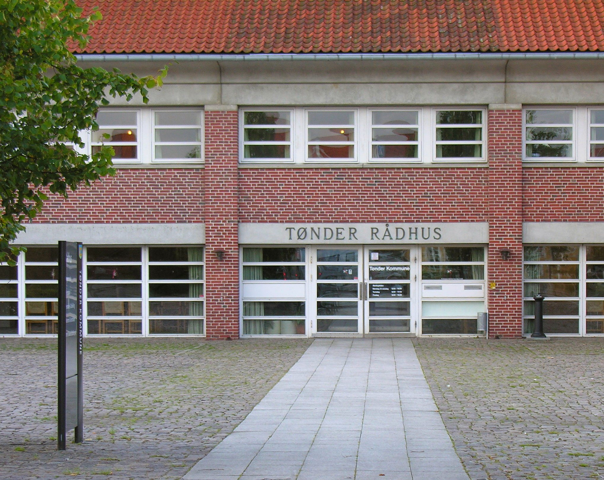 Tønder Rådhus Danmark photo 2007 Wolfgang Pehlemann DSCN6141